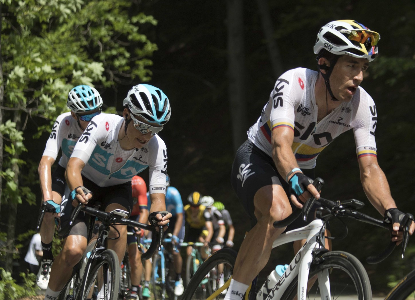 GIR40220 henao elissonde froome